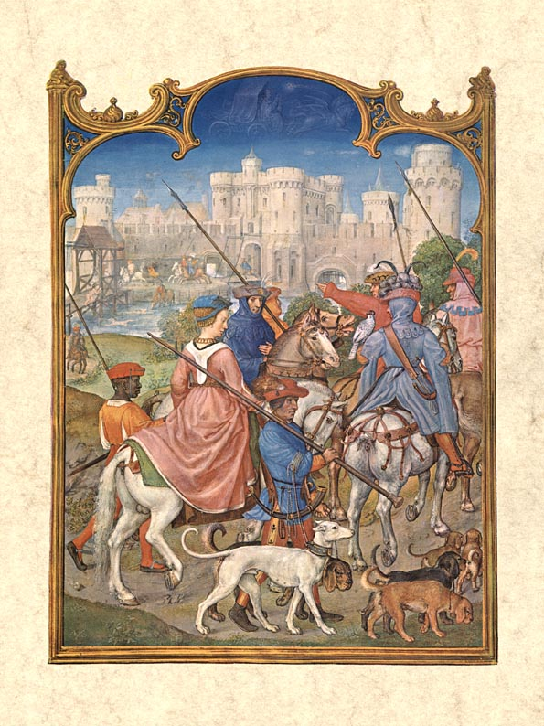 August, Brevarium Grimani, fol. 9v (Flemish)